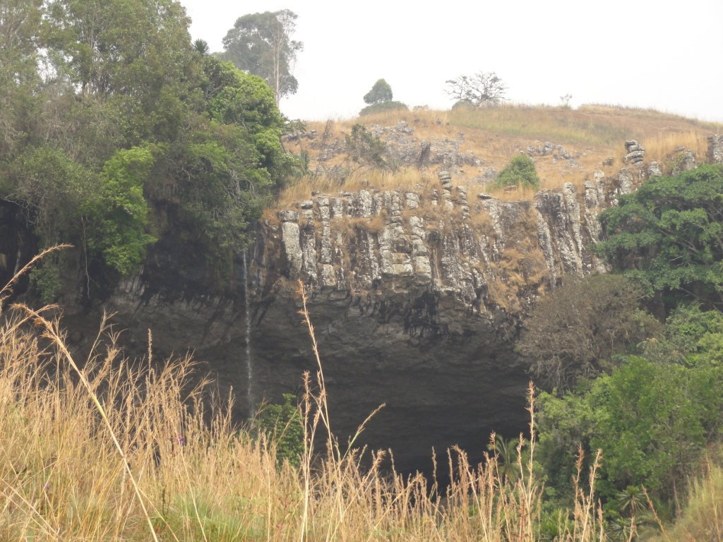 Vue à distance de la chute de Fongo-Tongo à Dschang